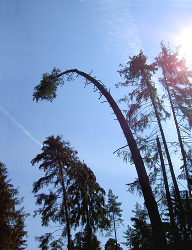 Wenn der Böhmische Wind weht! Fotograf: Walter J. Pilsak Copyright Status: GNU Freie Dokumentationslizenz